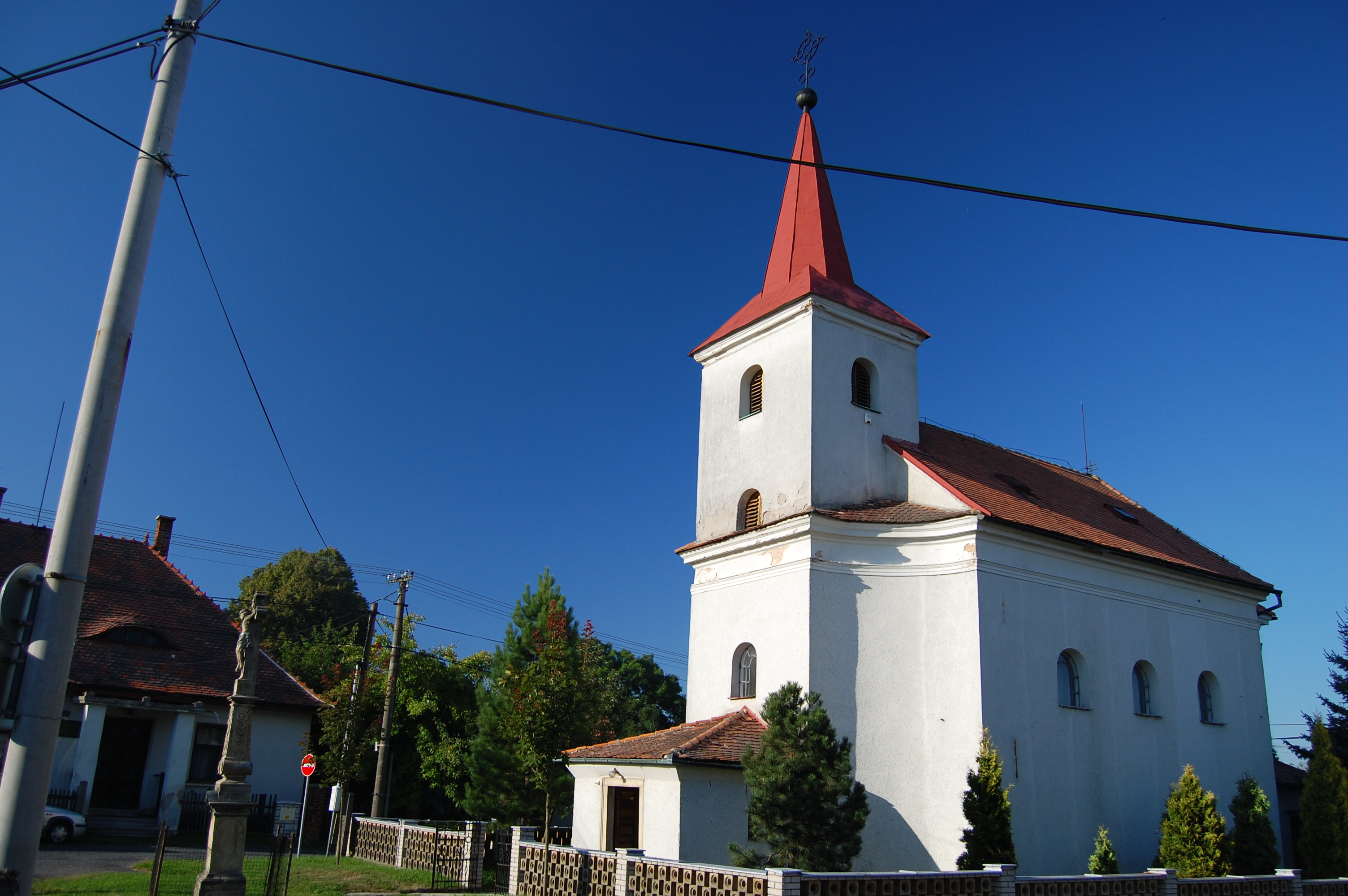 Kostel Panny Marie Bolestné, Šubířov, okres Prostějov